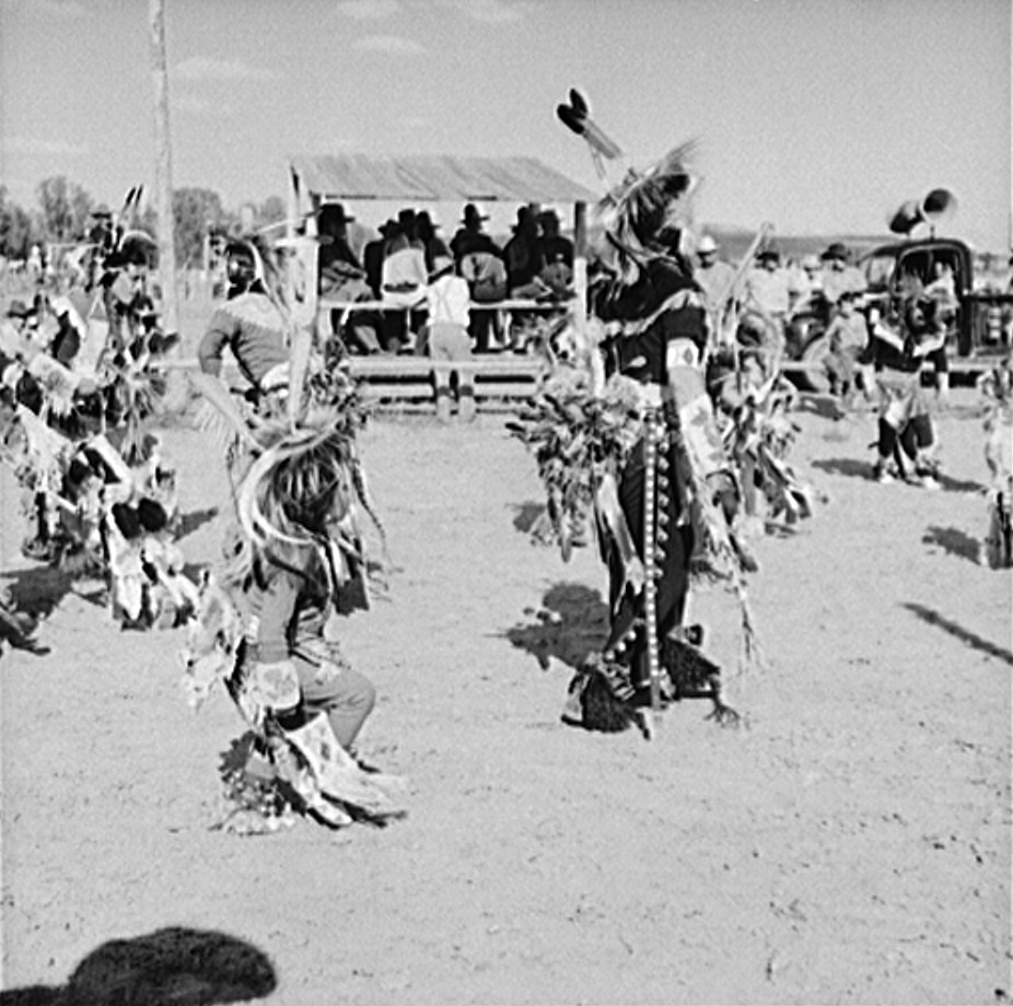 Crow Indian dance at annual fair. Crow Agency, Montana Aus der Library of Congress. Public Domain nach US-Recht Crow Indian dance at annual fair. Crow Agency, Montana. Wolcott, Marion Post, 1910- photographer. CREATED/PUBLISHED 1941 Sept. NOTES Title and other information from caption card. Transfer; United States. Office of War Information. Overseas Picture Division. Washington Division; 1944. SUBJECTS Nitrate negatives. United States--Montana--Big Horn County--Crow Agency. MEDIUM 1 negative : nitrate ; 2 1/4 x 2 1/4 inches or smaller. CALL NUMBER LC-USF34- 058815-E REPRODUCTION NUMBER LC-USF34-058815-E DLC (b&w film nitrate neg.) PART OF Farm Security Administration - Office of War Information Photograph Collection (Library of Congress) REPOSITORY Library of Congress Prints & Photographs Division Washington, DC 20540 DIGITAL ID (intermediary roll film) fsa 8c31553